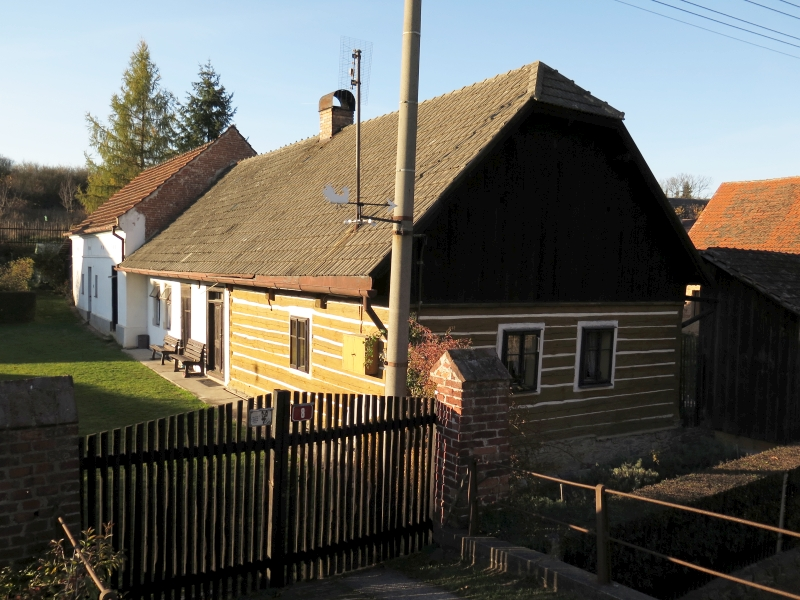 Zemědělský dvůr čp. 8, Rybnice 8, Rybnice.